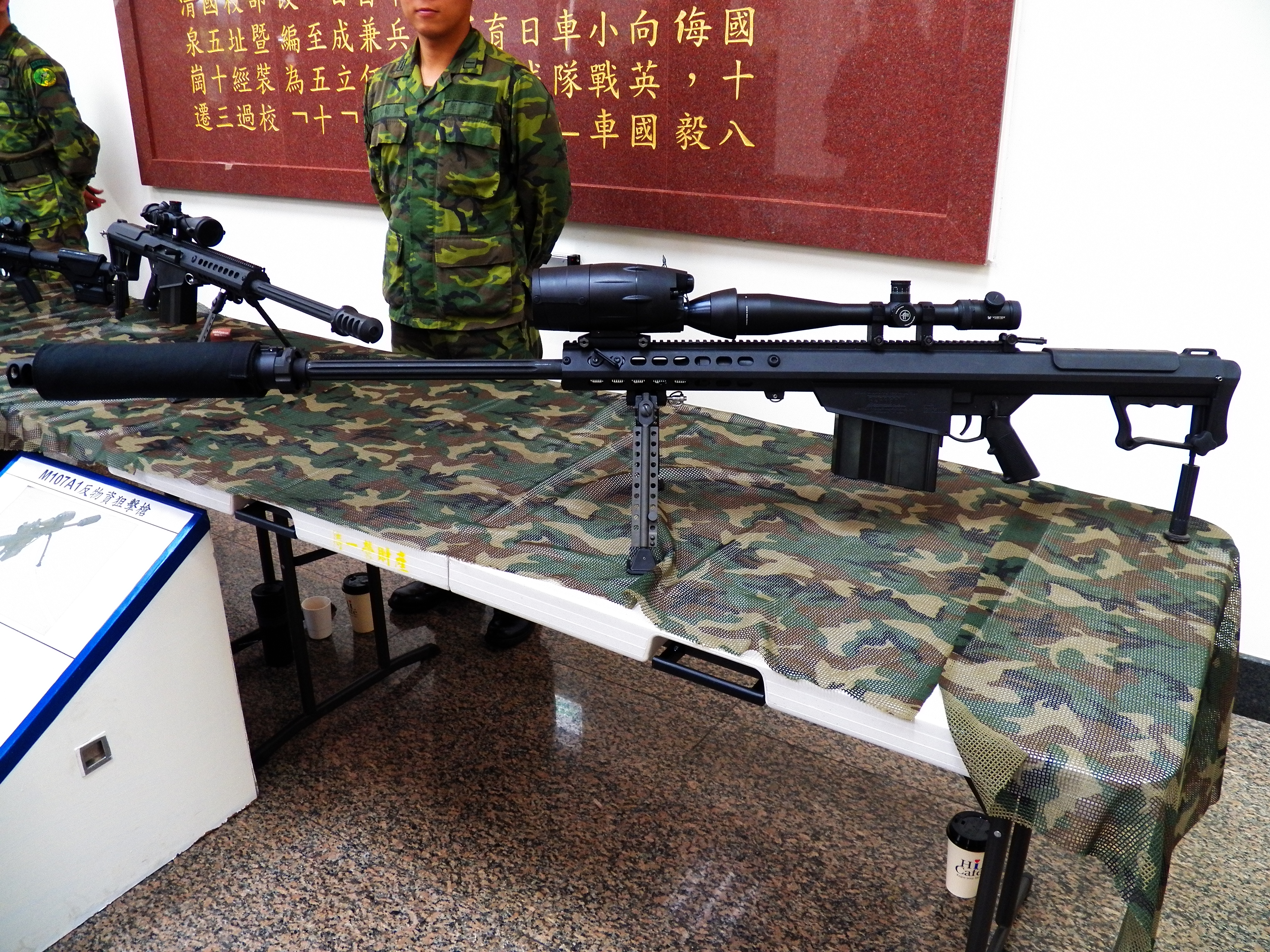 2013年裝甲兵學校營區開放活動，校史館一樓大廳西側同時展示另一挺槍口加裝滅音器、槍身加裝夜視器的夜戰式樣巴雷特M107A1反物資狙擊槍。